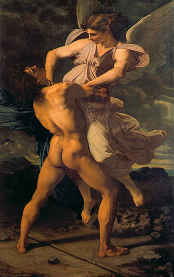 La lutte de Jacob avec l'angelabel QS:Lfr,"La lutte de Jacob avec l'ange"